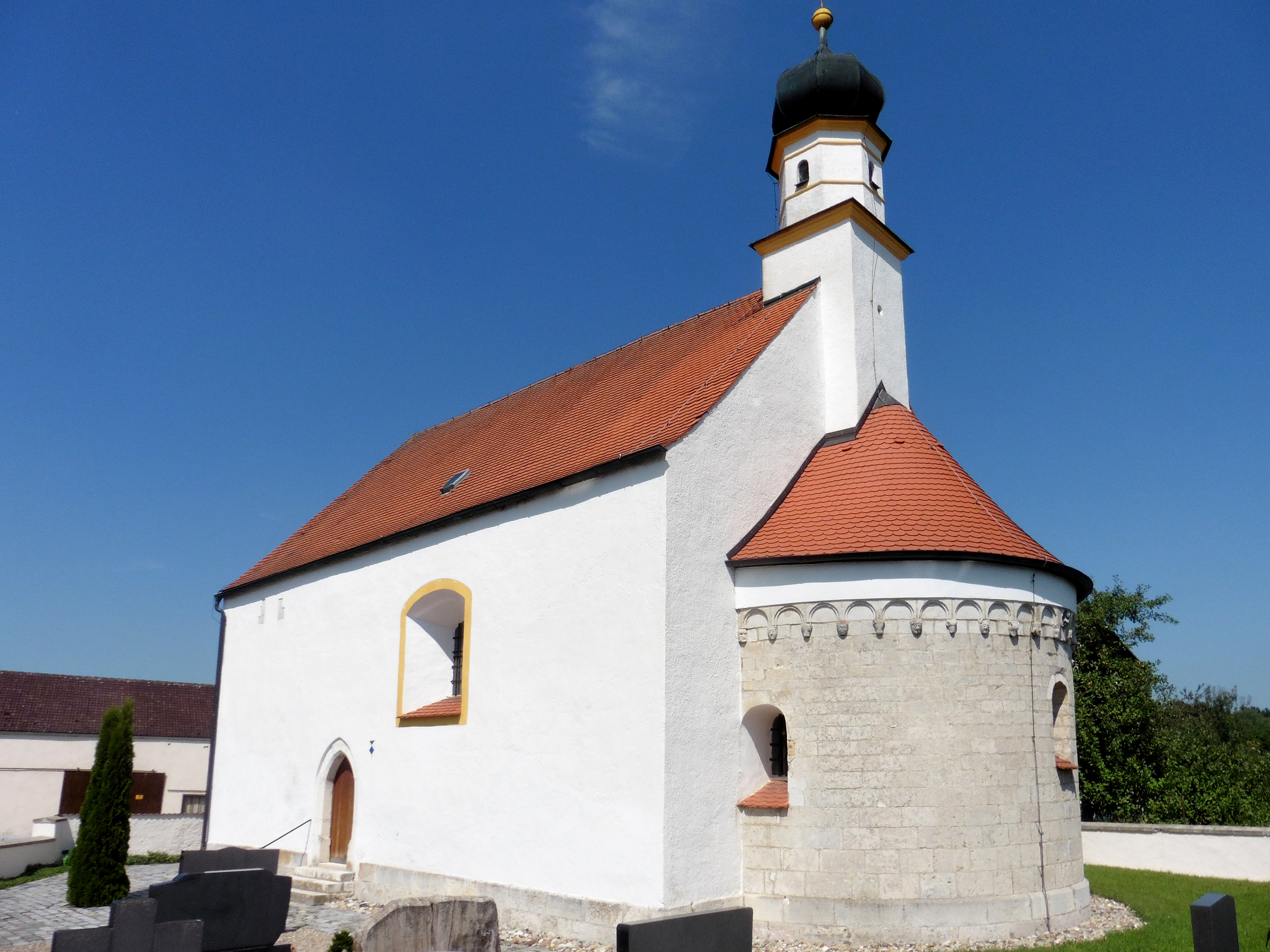 Katholische Filialkirche St. Margareta in Weißendorf bei Oberdolling im oberbayerischen Landkreis Eichstätt. Romanisch, vermutlich in den 1170er Jahren erbaut. Ansicht von Südsüdosten. This is a photograph of an architectural monument.